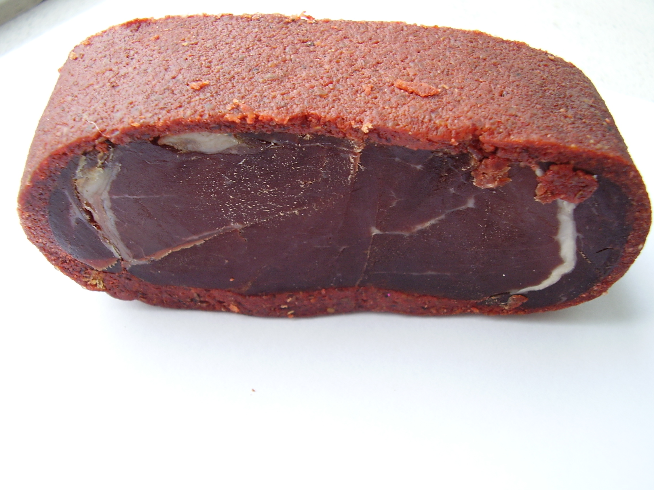 бастурма, Basturma or Pastroma from Armenia, luftgetrockneter Schinken im Paprikamantel, Paprika leicht scharf, mit etwas Knoblauch im Paprika